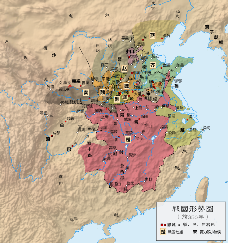 战国